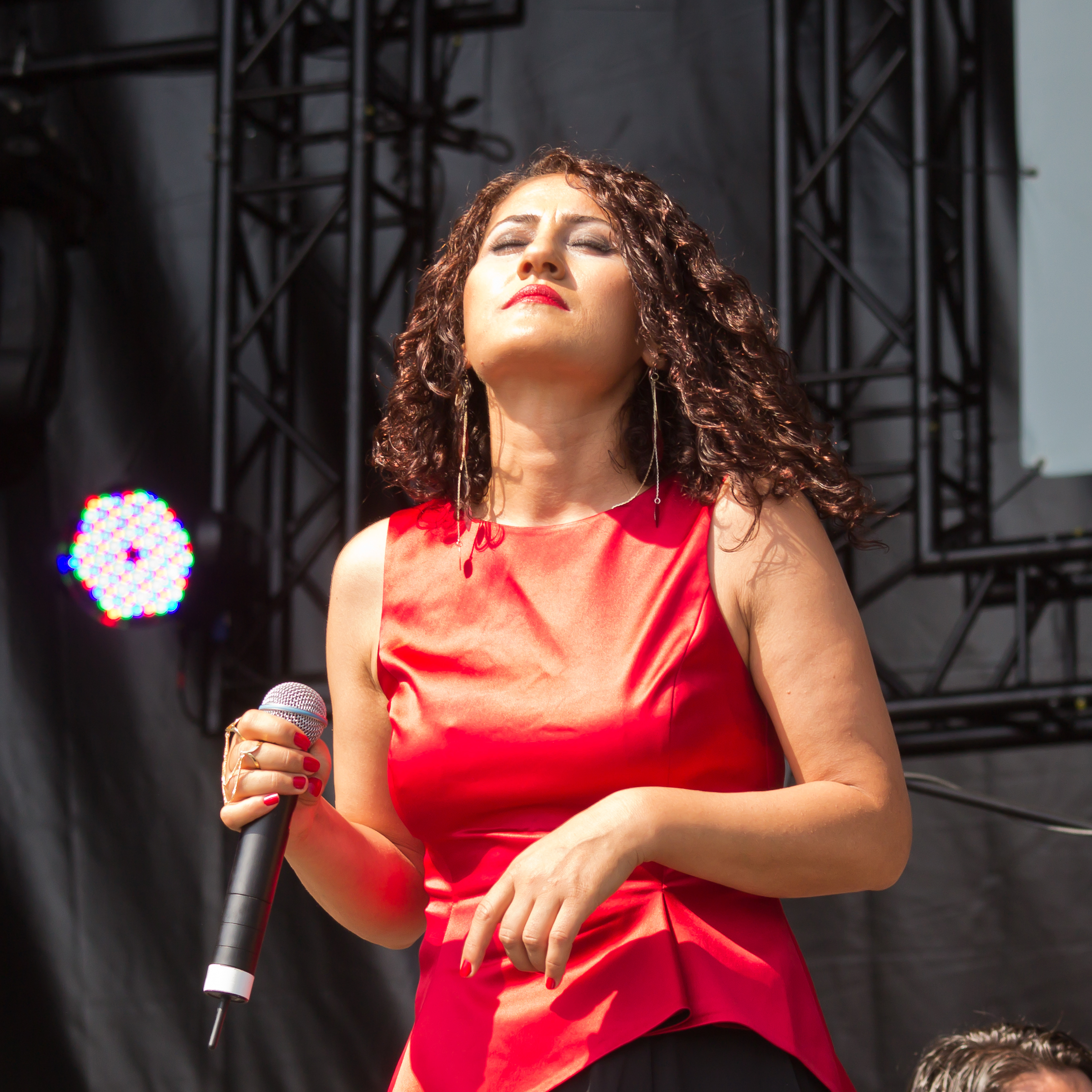 Birlikte - Kundgebung - Aynur Doğan